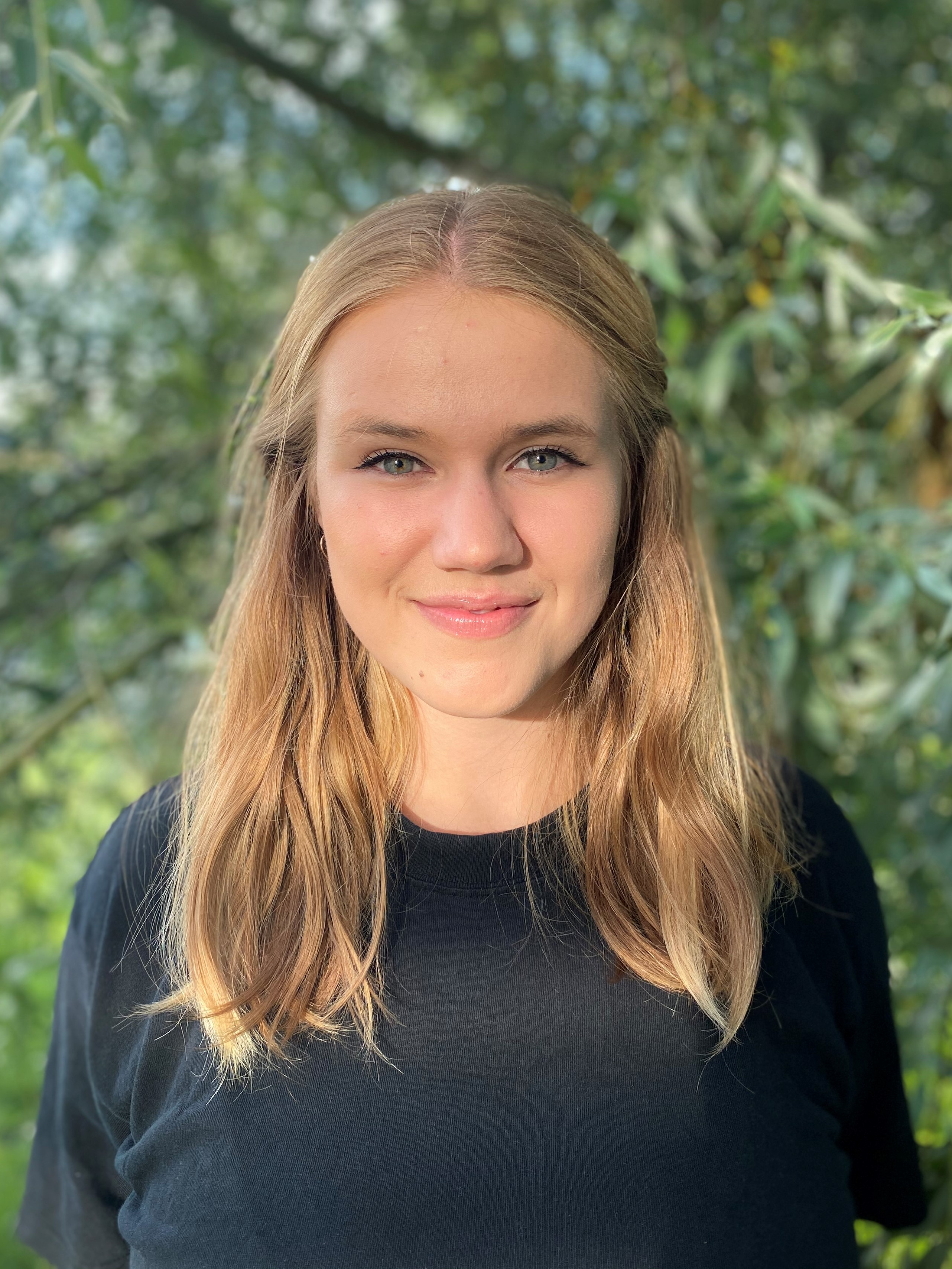 Pressebilde av Lea Mariero